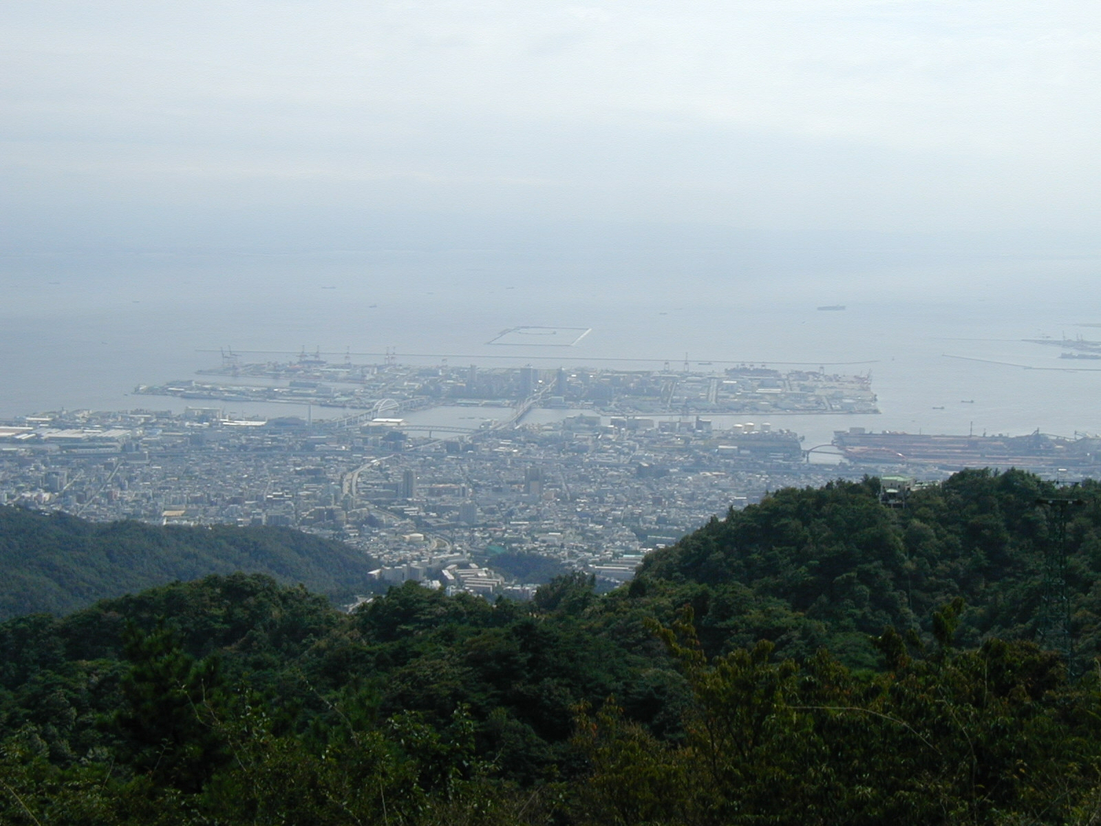 Rokko Island (六甲アイランド)